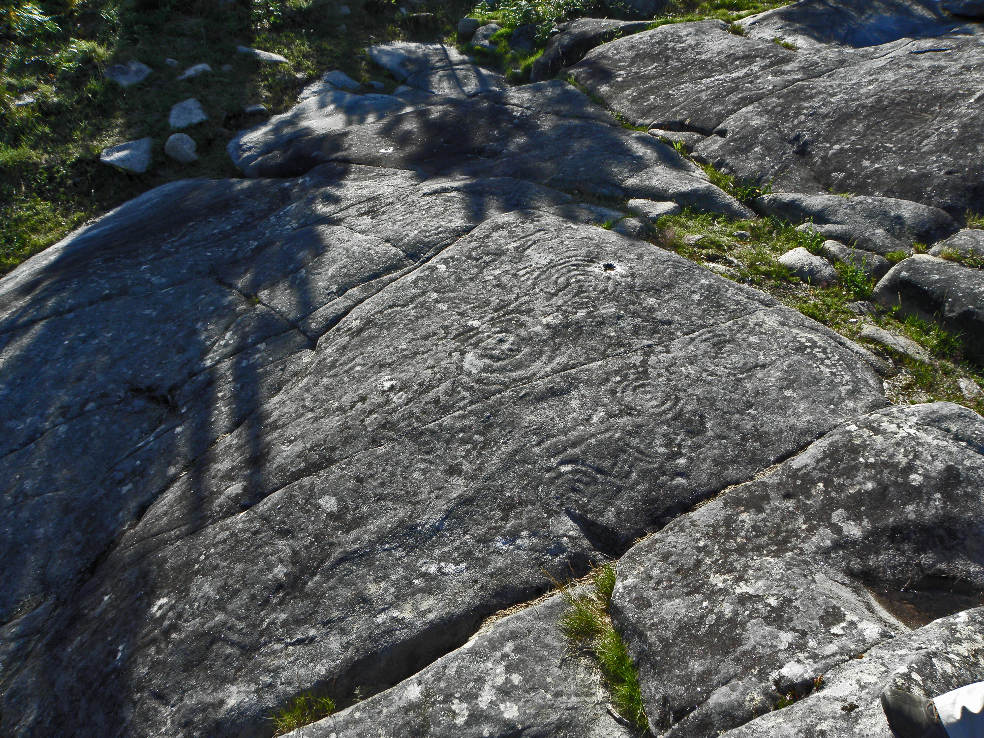 Esta foto participa En Otro Lugar de Flickr